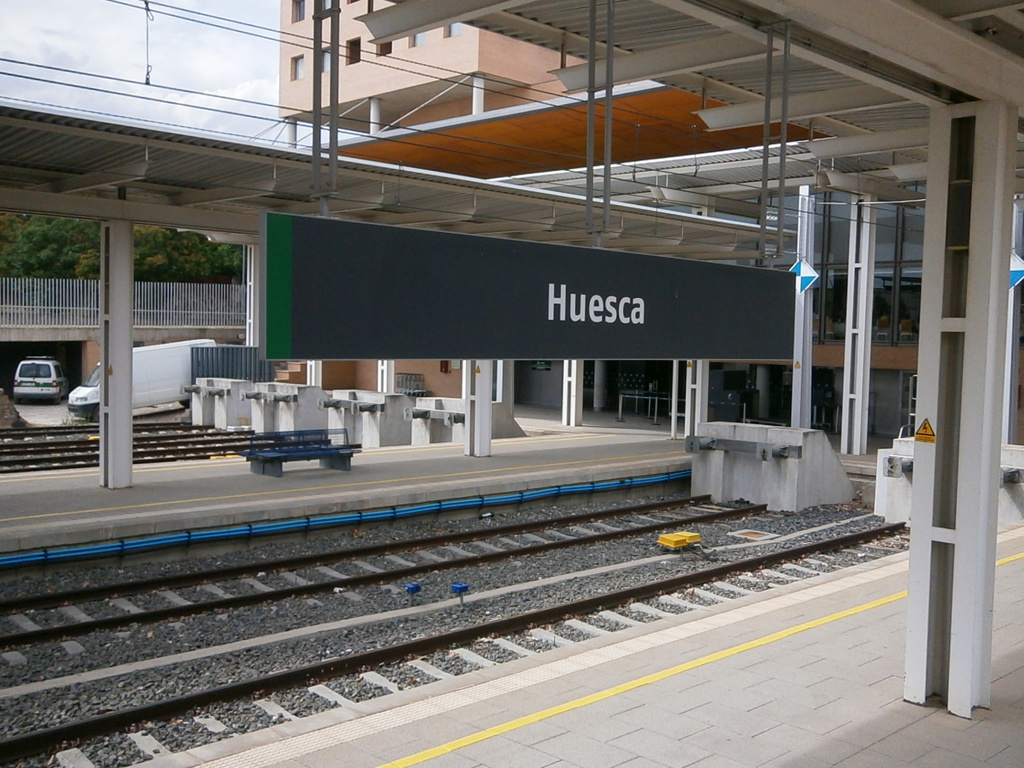 Andenes de la estación de Huesca